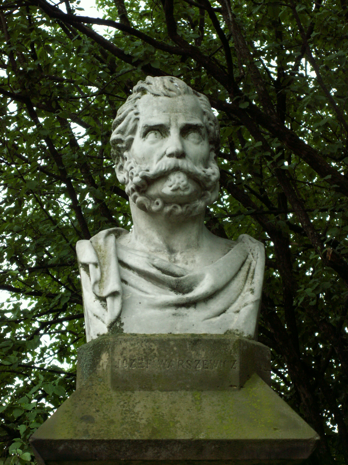 Autor/author: pl: Macieias en: Józef Warszewicz - Postument in Botanical garden in Kraków pl: Józef Warszewicz - Ogród Botaniczny w Krakowie